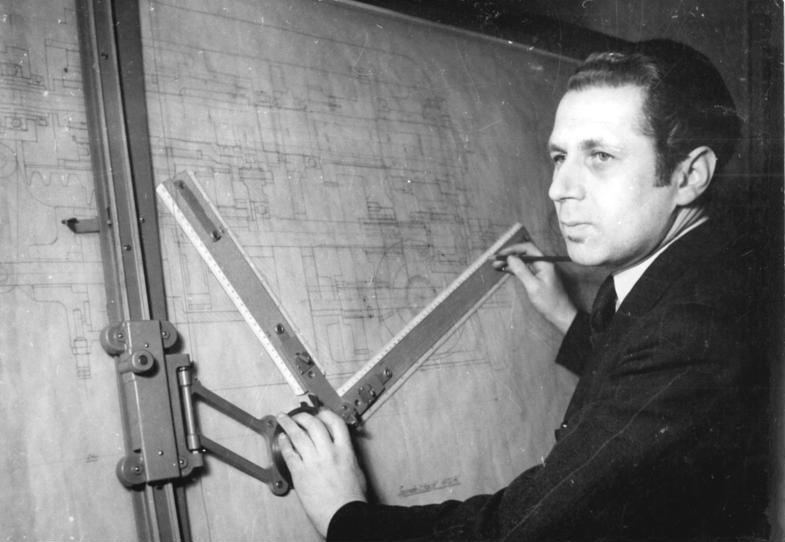 Ingenieur am Reissbrett zeichnend Illus Biscan 26.1.51 Weitere Verbesserung des "Rasenden Magdeburgers" (Vielstahl-Drehbank). Der Chefkonstrukteur der volkseigenen Magdeburger Werkzeugmaschinenfabrik, Oberingenieur Nationpreisträger Moritz Schöbel, arbeitet gegenwärtig an weiteren Verbesserungen seines "Rasenden Magdeburgers" (Vielstahl Drehbank), Ebenfalls konstruiert er neue Werkzeugmaschinen, die in absehbarer Zeit wesentlich zur Produktionssteigerung unserer Industrie beitragen werden. UBz: Nationalpreisträger Schöbel bei der Konstruktion einer neuen Werkzeugmaschine. Eines der Ziele seiner Arbeit ist die Entwicklung neuer automatisierter Drehbänke, die auch von ungelernten Kräften bedient werden können. Leihweise Illus Berlin W 8